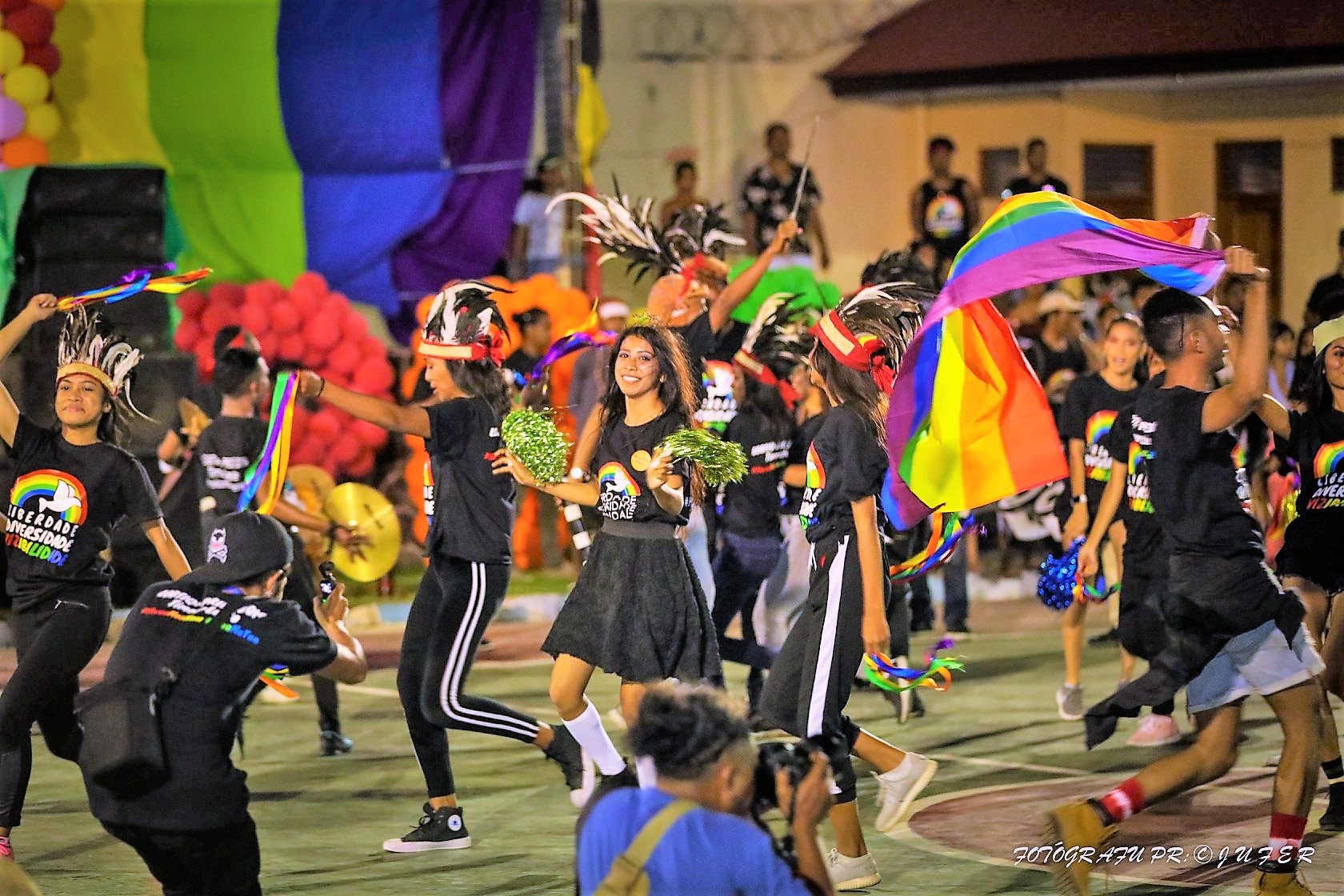 Pride day 2019 in Dili, Osttimor